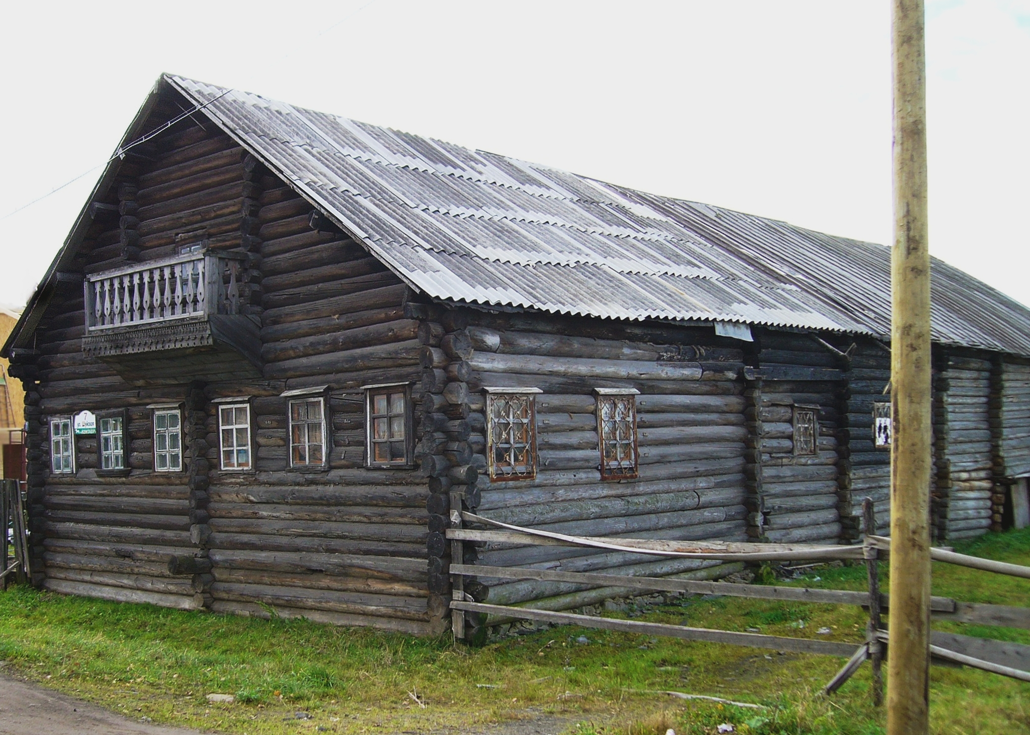 Дом Курланского. Вид слева. Петрозаводск, улица Шуйская, дом 7, сентябрь 2012 года.